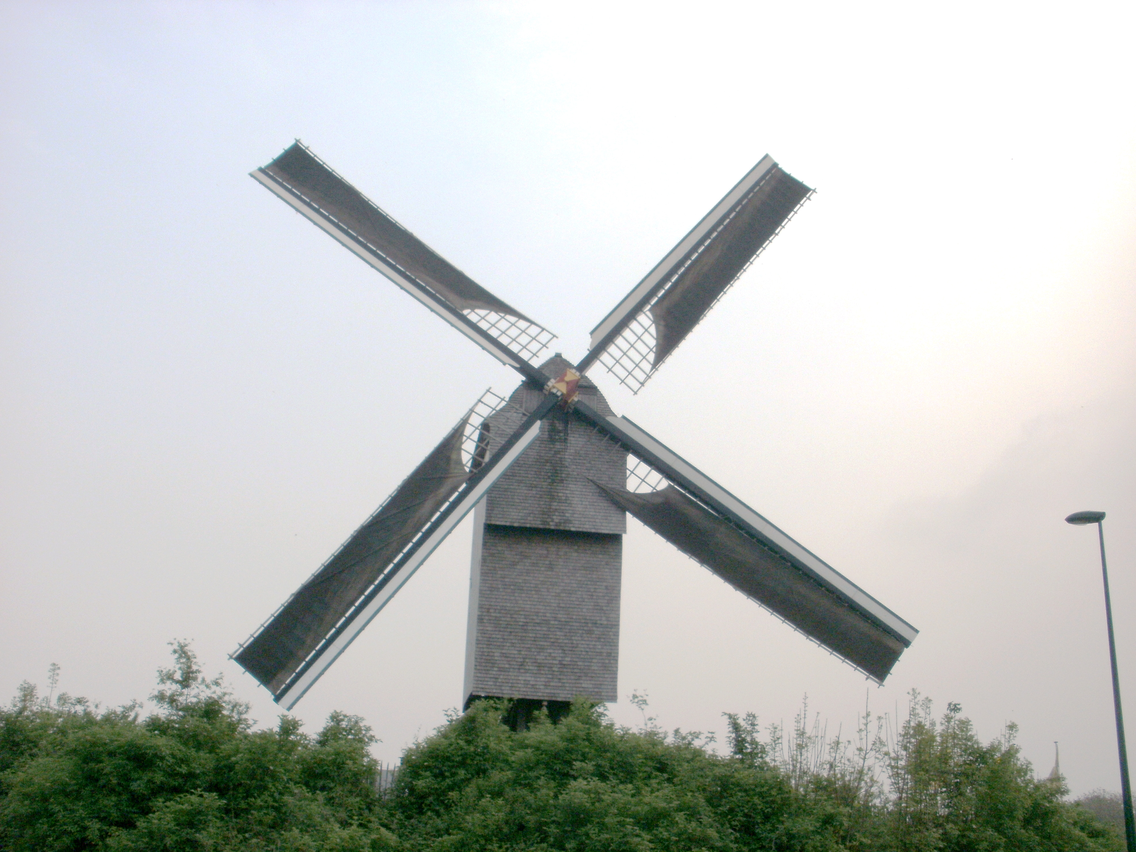 Buysesmolen met zeil op de wieken in Sint-Antelinks